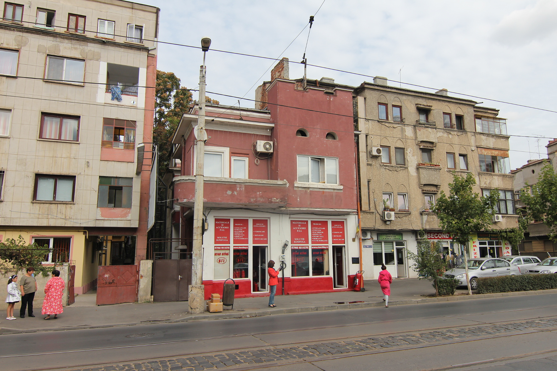 Casă pe Dudești